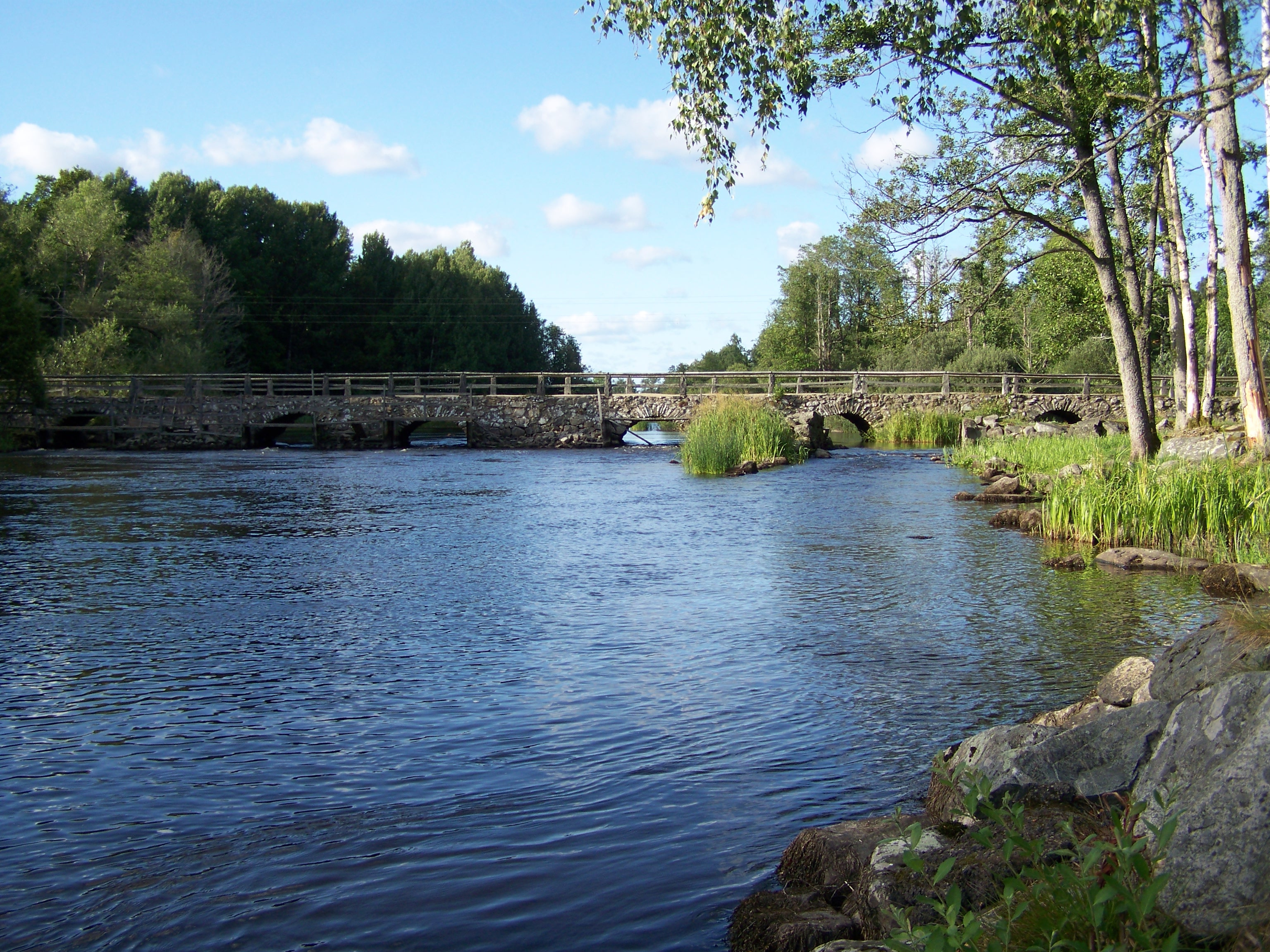 Blidingsholm, Steinbrücke über den Mörrumsån (2009-08-xx)